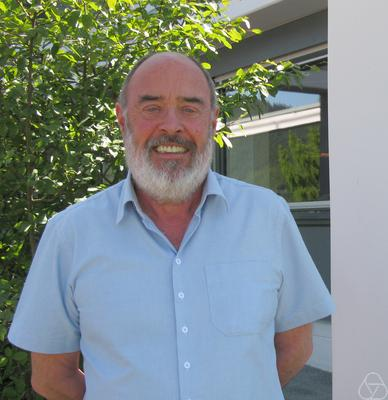 Foto di K. David Elworthy